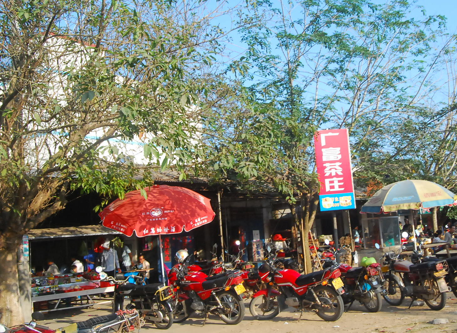 文昌街头